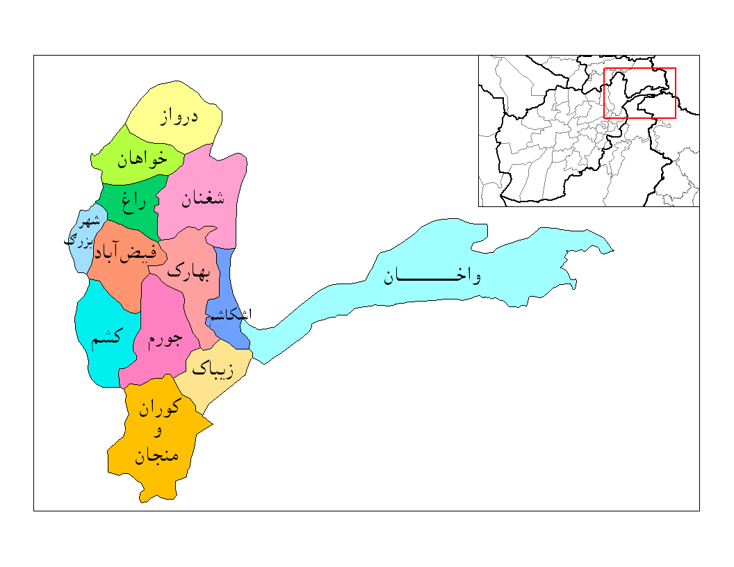 پښتو: دا په پښتو ژبه د بدخشان ولايت د ولسواليو د نخشې انځور دی.